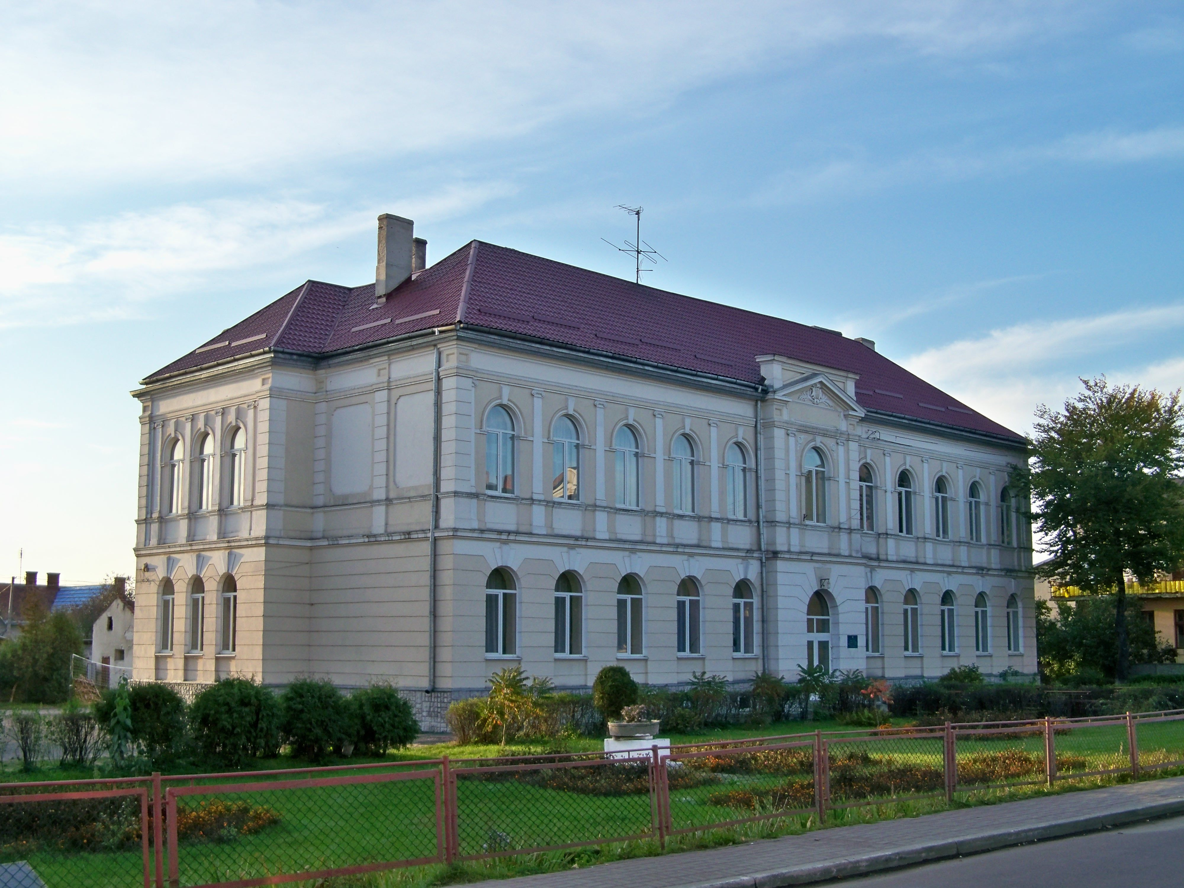 Школа, Рава-Руська, вул. Грушевського, 20